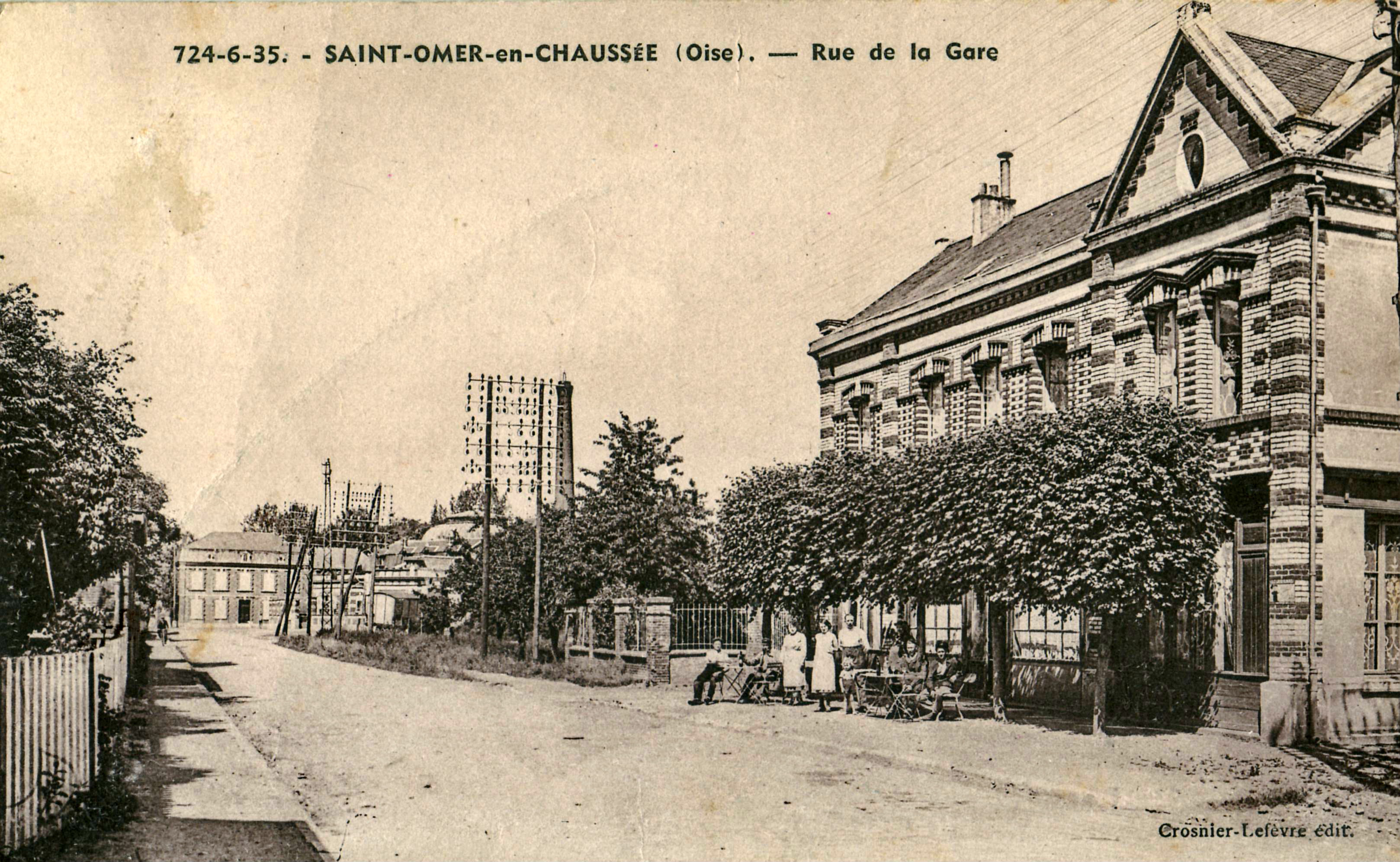 Carte postale ancienne éditée par Crosnier-Lefèvre, n°724-6-35 : SAINT-OMER-EN-CHAUSSEE - Rue de la Gare